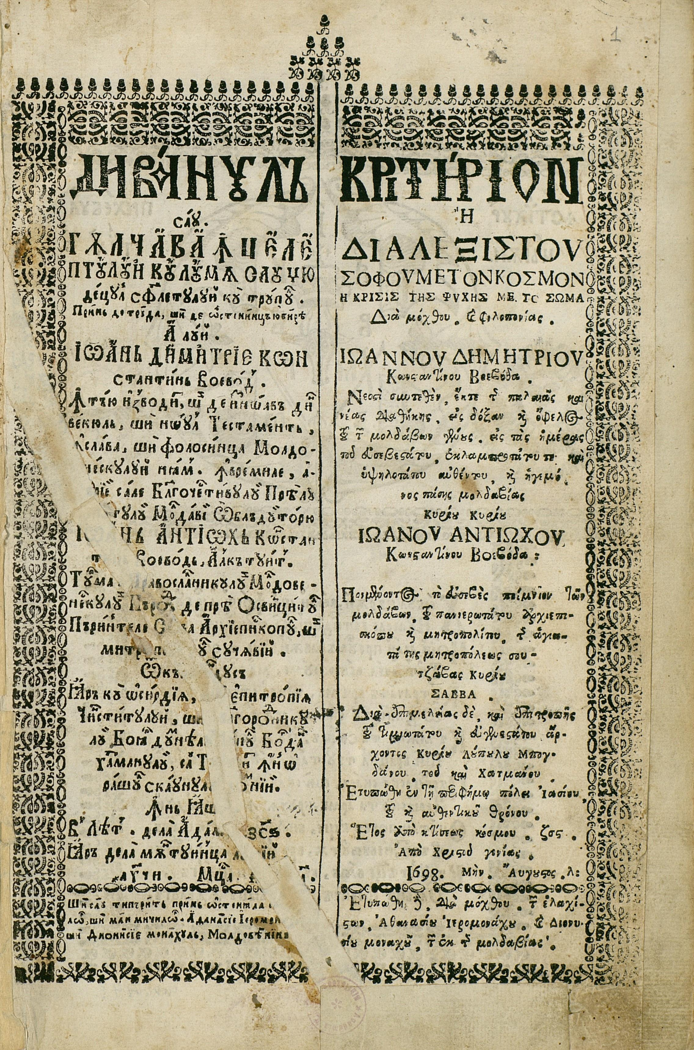 Pagină de titlu a lucrării „Divanul sau gâlceava înţeleptului cu lumea sau giudeţul sufletului cu trupul”, Iaşi, 1698, de Dimitrie Cantemir.